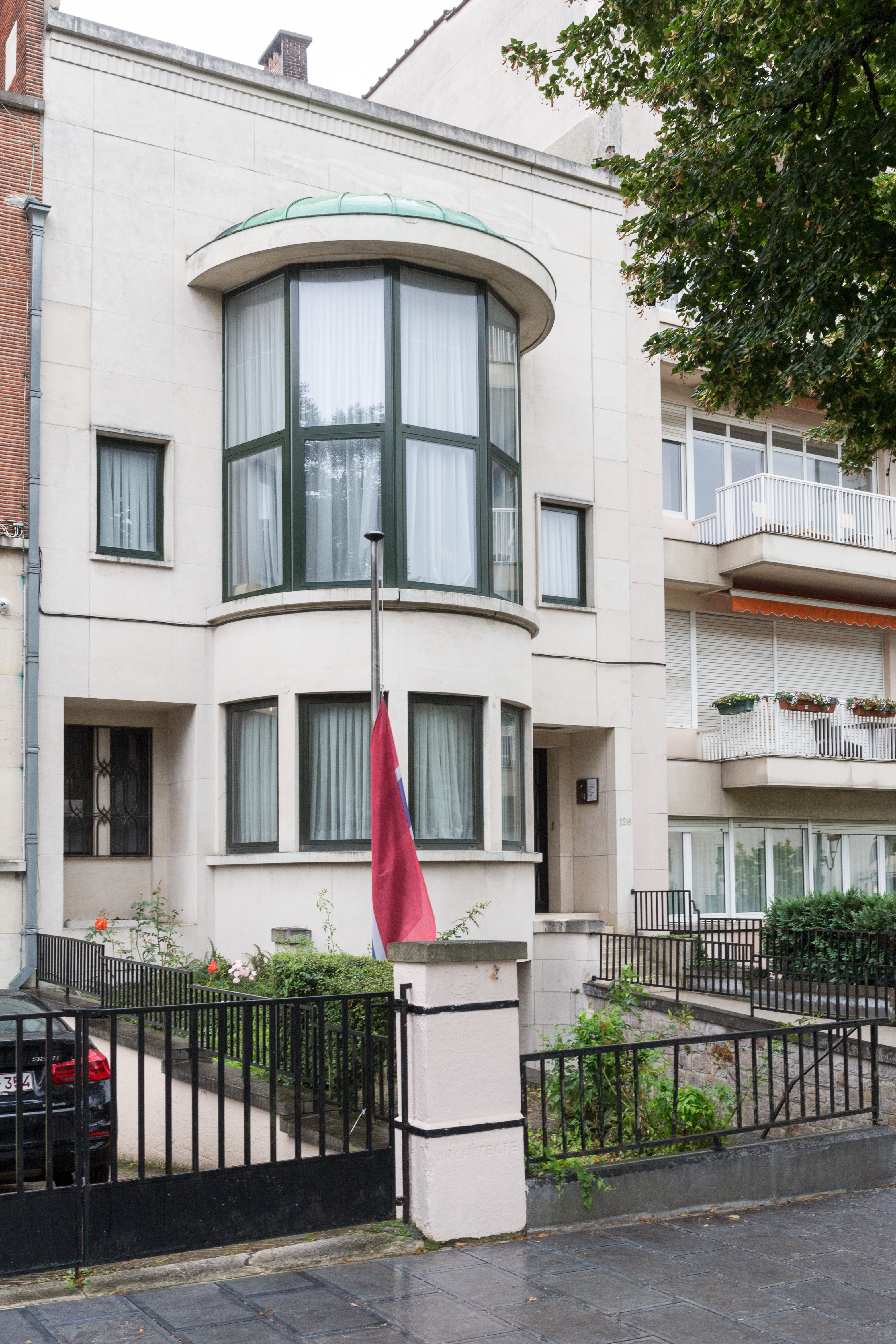 Ambassade de Gambie en Belgique, Avenue Franklin Roosevelt 126, Bruxelles.